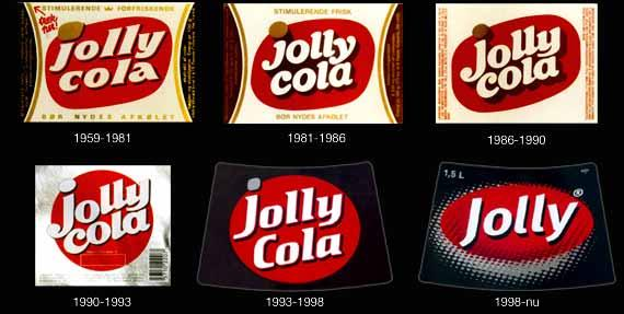 Jolly etiketter gennem tiden